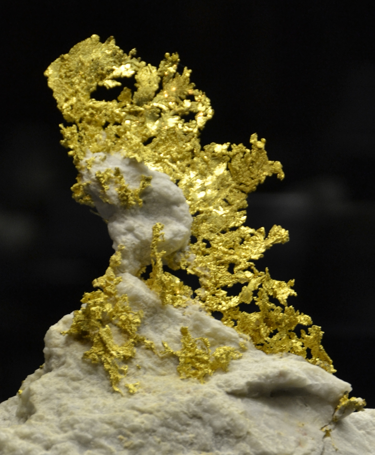 Ausstellungsstücke des "Museum Reich der Kristalle" in München.